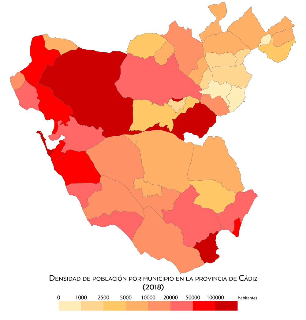 Población por municipio en la provincia de cádiz 2018